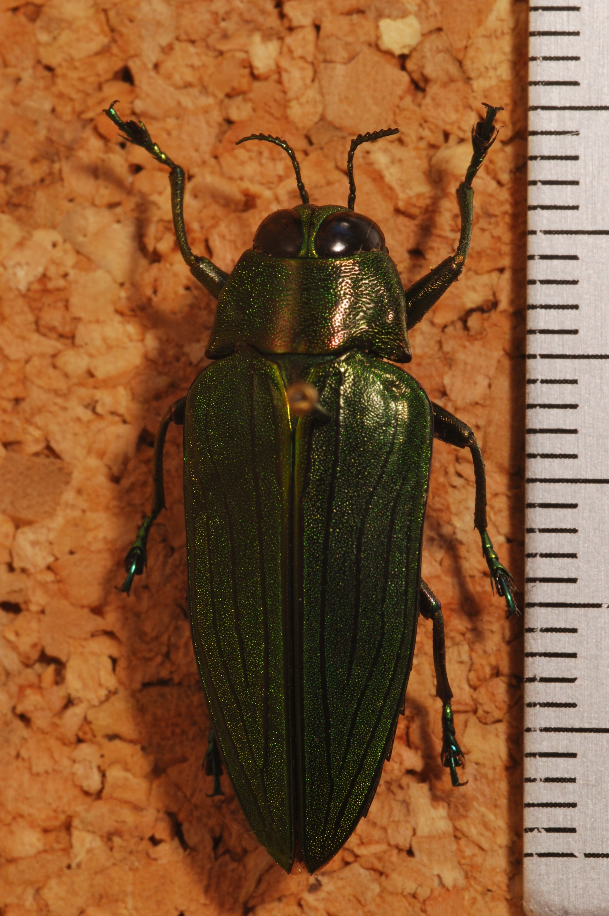 Ebogo, CAMEROON